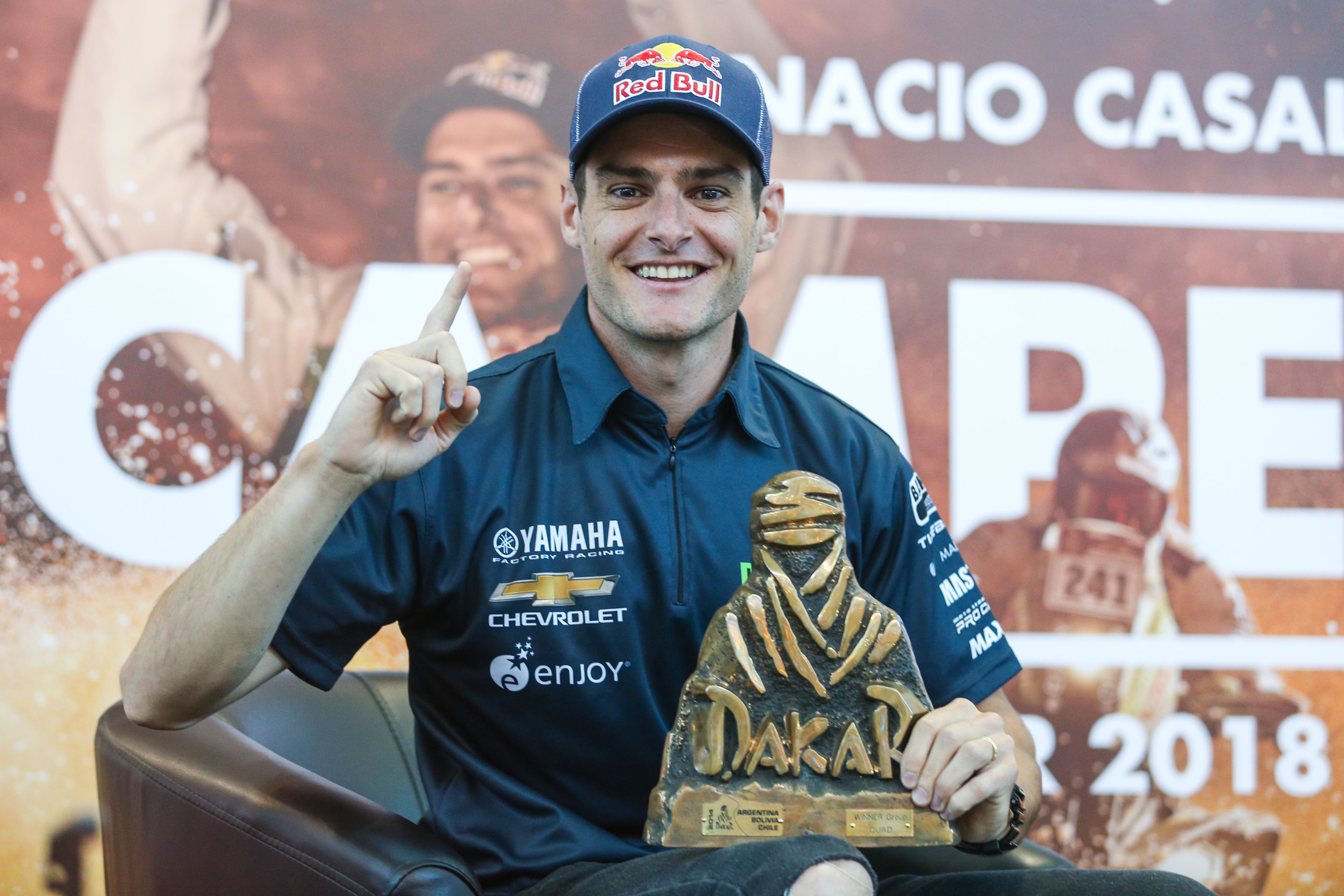 Ignacio Casale, ganador en Quads de Dakar 2018 ya se encuentra en nuestro país mostrando el gran orgullo el touareg, reconocimiento histórico de esta competencia. Piloto tuvo el apoyo de @INDChileOficial FELICITACIONES!!!!